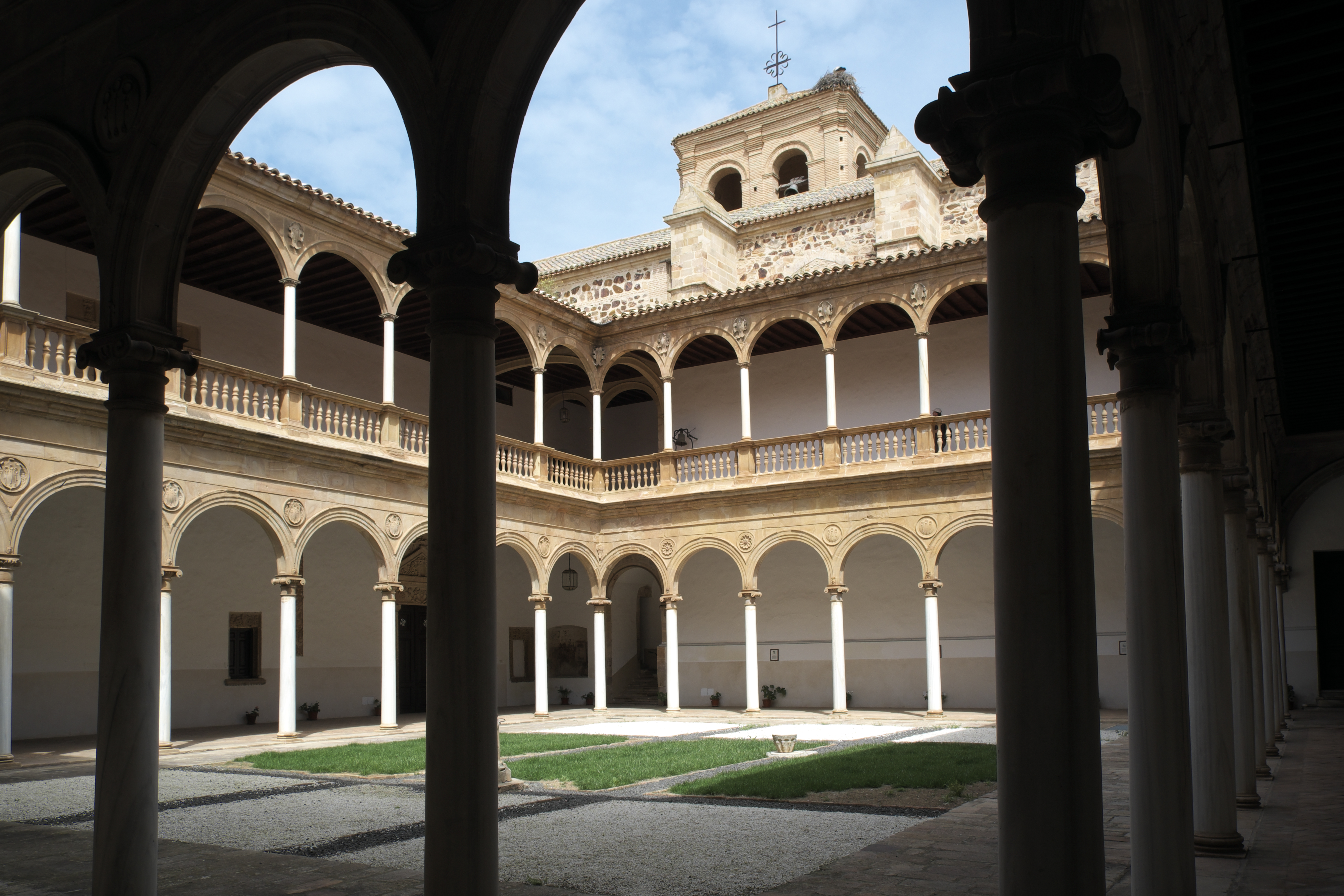 Ehemaliges Frauenkloster des Calatrava-Ordens, Convento de la Asunción (Mariä Himmelfahrt), in Almagro in der Provinz Ciudad Real (Kastilien-La Mancha/Spanien), Renaissance-Kreuzgang